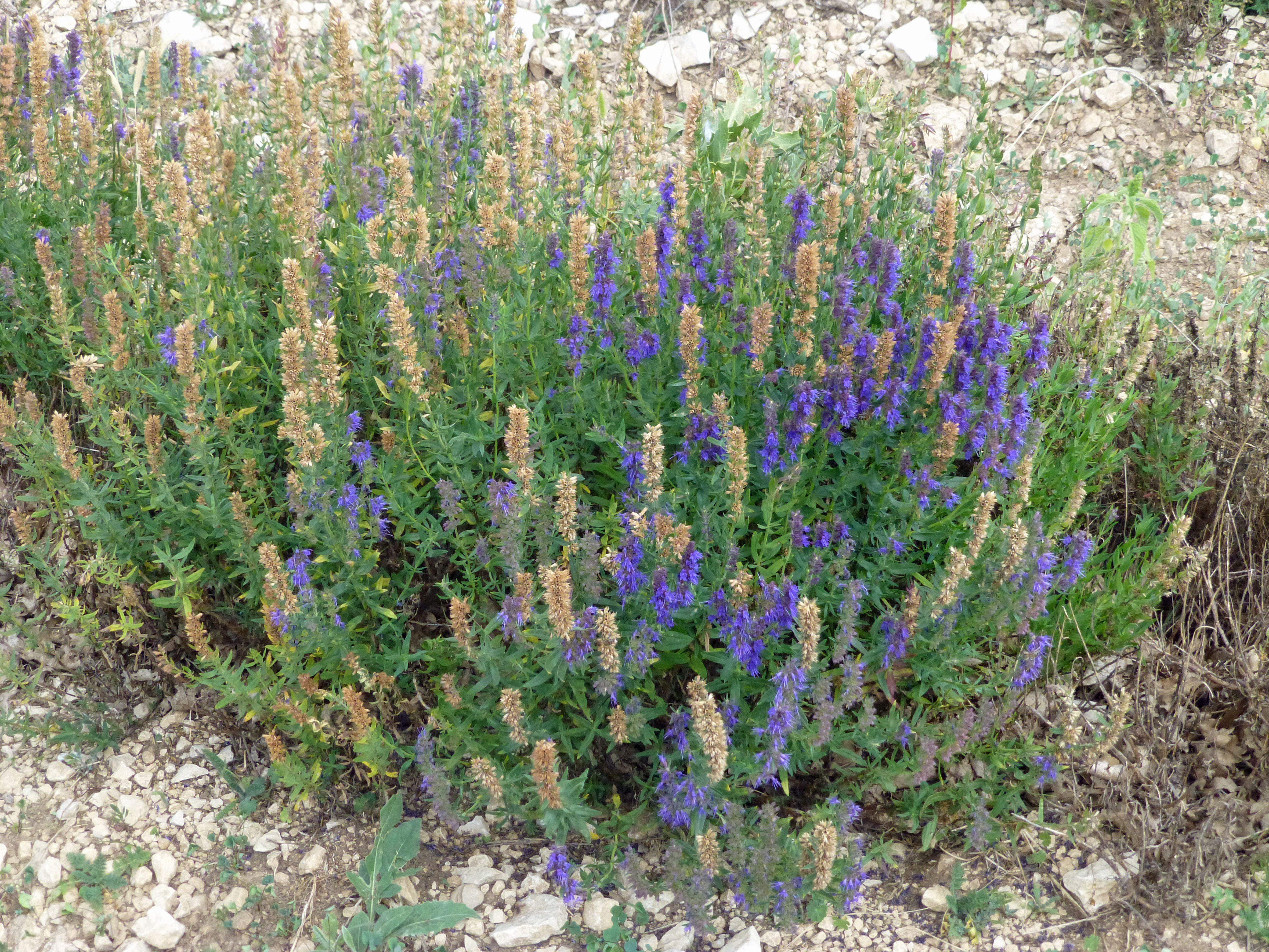 Lavandula latifolia (ou lavande aspic) en fleurs, fin août près de Sault (Vaucluse)